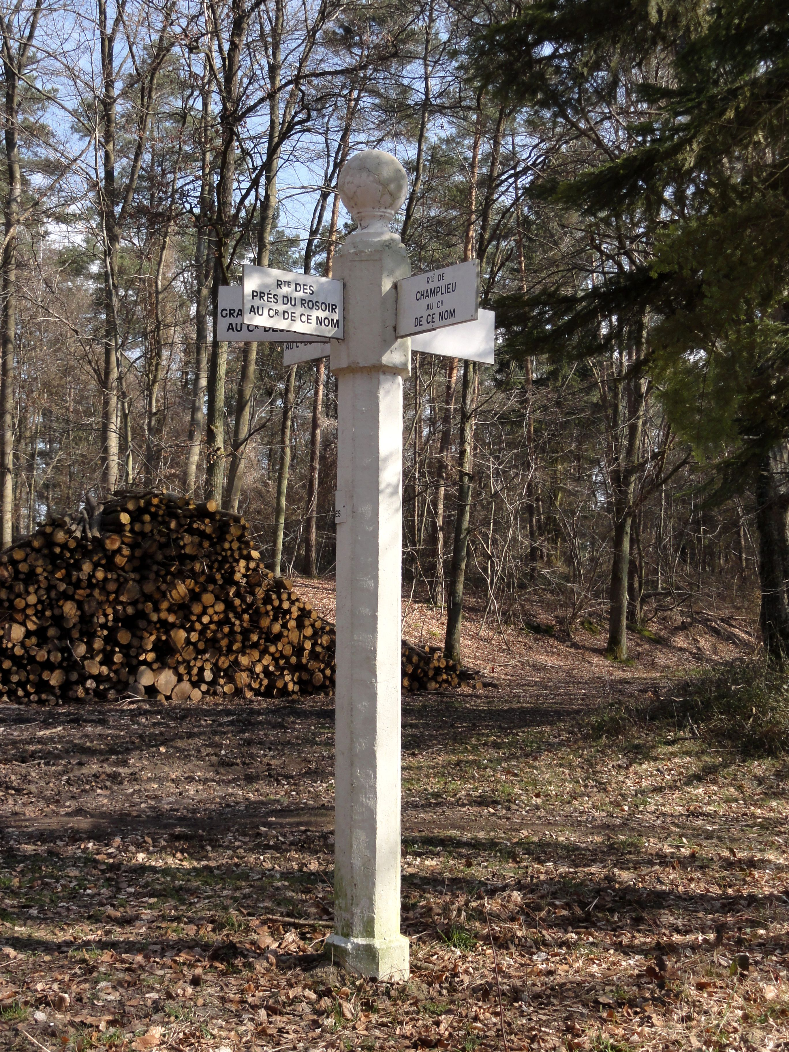 Poteau au carrefour des Princesses.